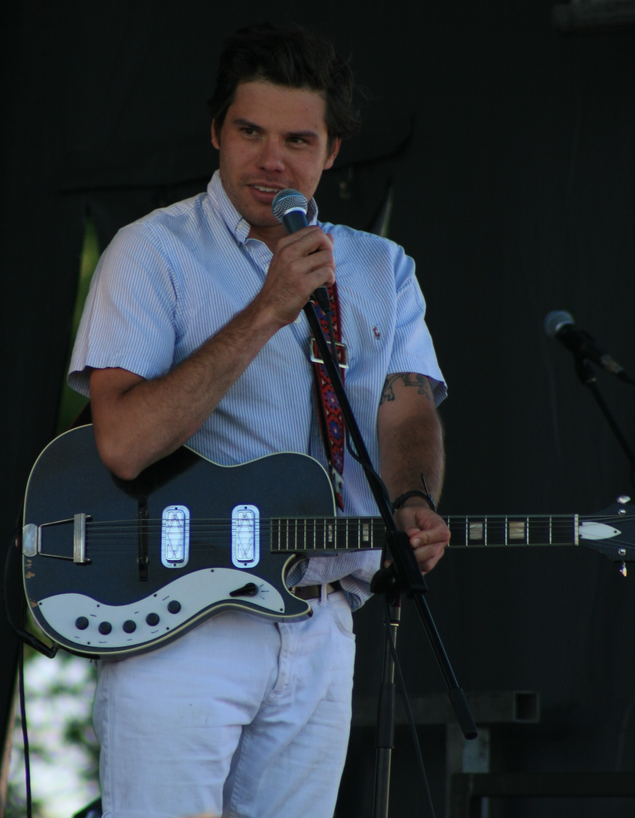 Bahamas